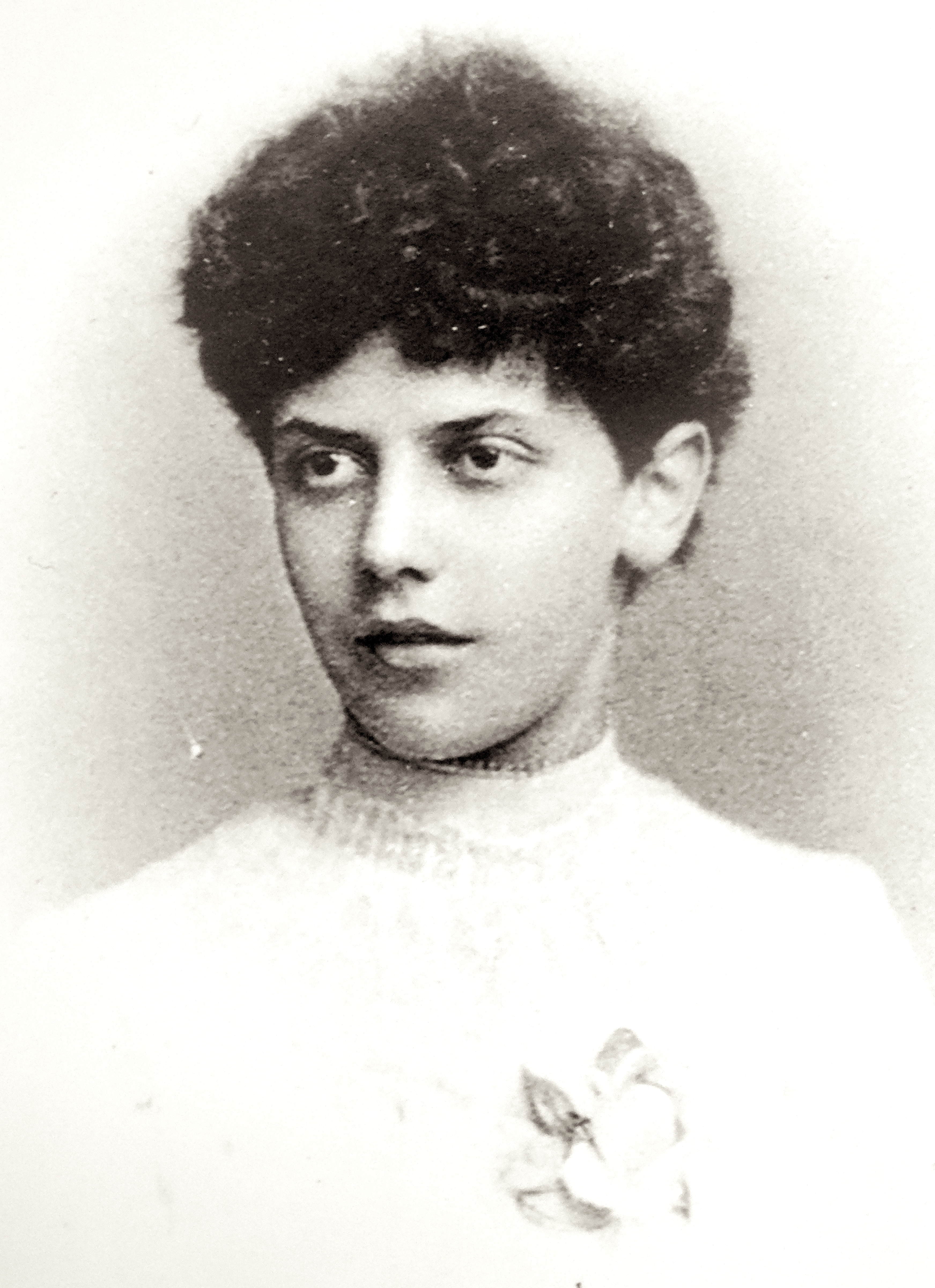 Eugen Bleuler: Gattin Hedwig Bleuler-Waser